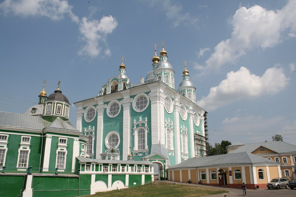 Успенский собор (Смоленск)